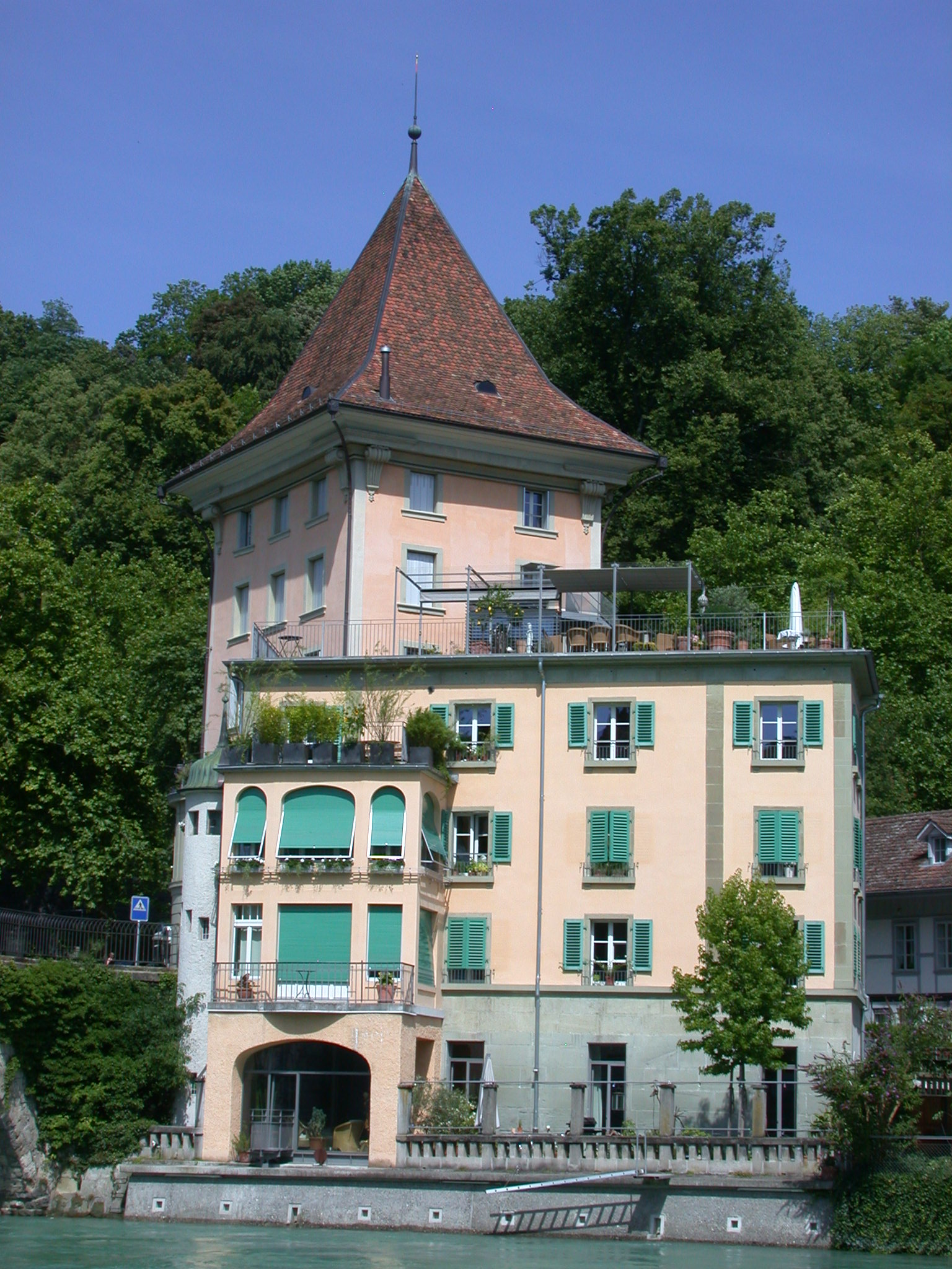 Die Felsenburg, ein ehemaliger Befestigungsturm der Stadt Bern.